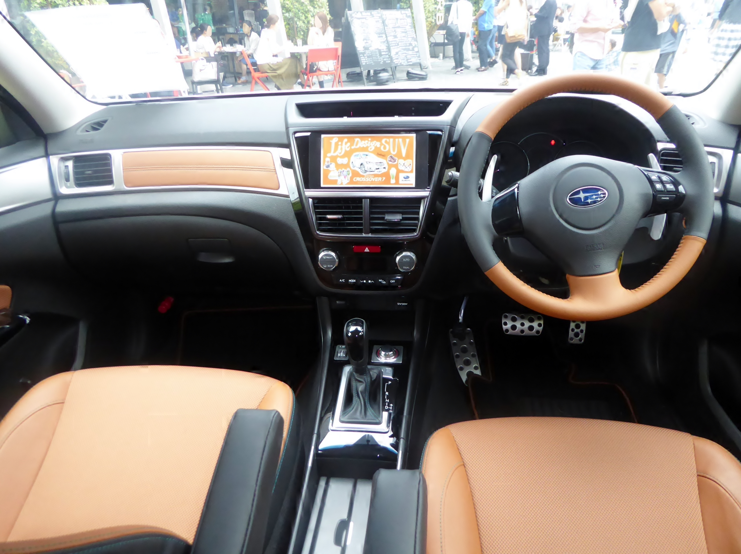 YAM型スバル・エクシーガクロスオーバー7 2.5i EyeSightのインテリアを撮影。